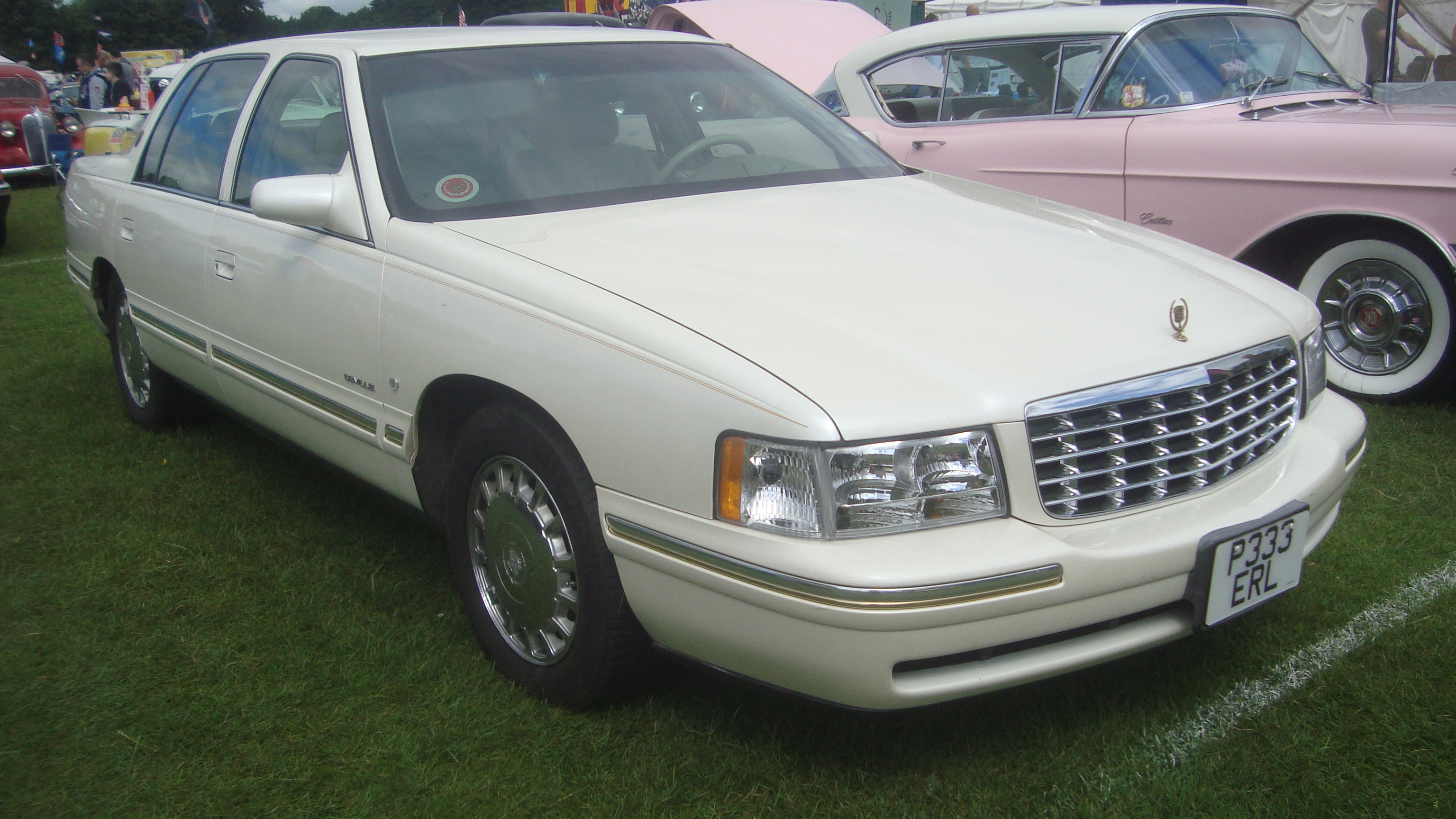 1999 Cadillac DeVille 4.6 V8